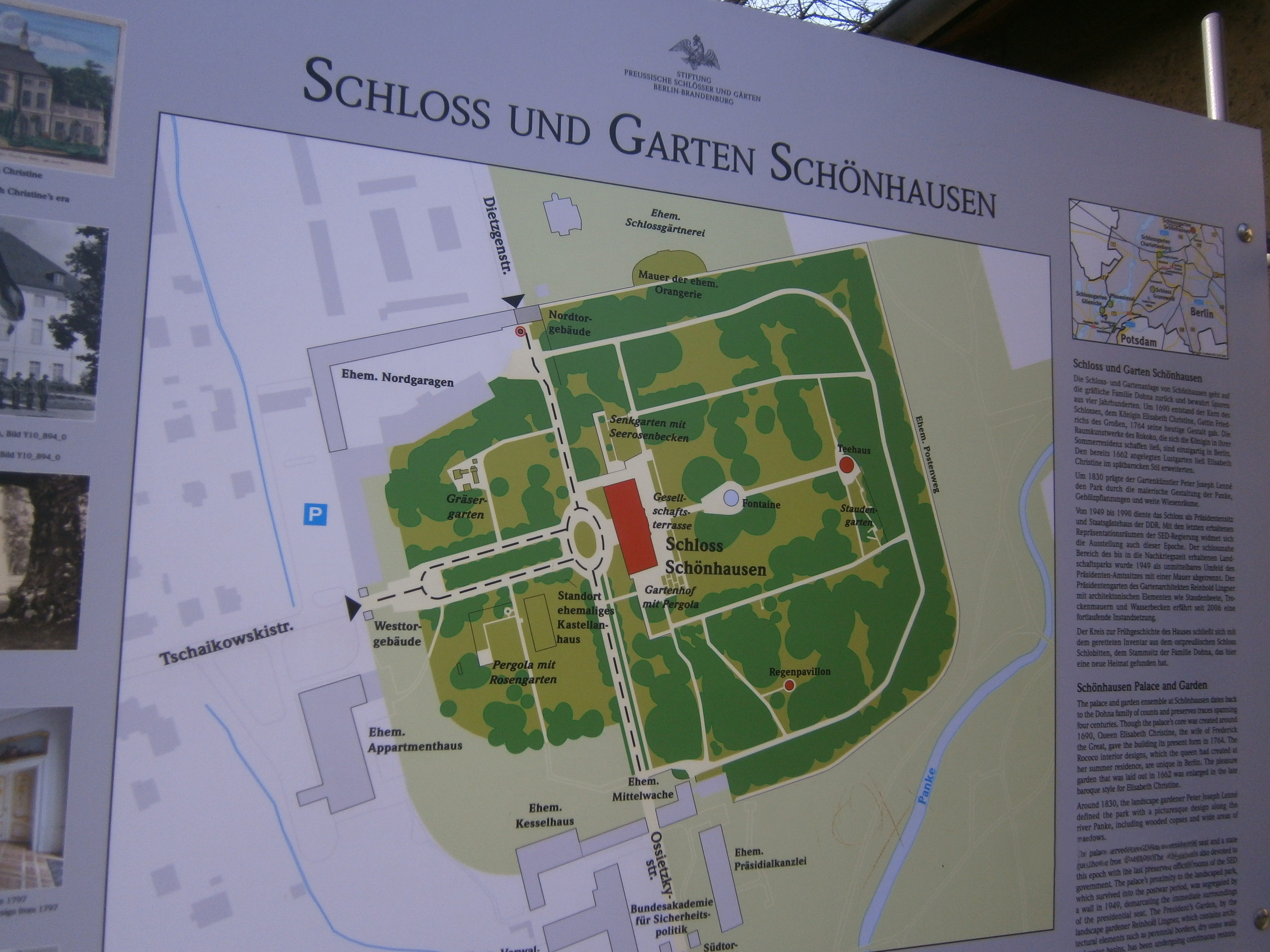 Dietzgenstraße ist eine Straße in Berlin-Niederschönhausen. Am Südende der Straße befindet sich der Schlosseingang, der Lageplan.